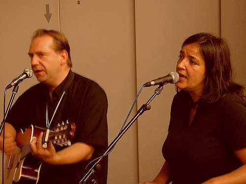 Rev. Christian Daveler und Almut Klotz geben ein Konzert auf der Frankfurter Buchmesse, Oktober 2005